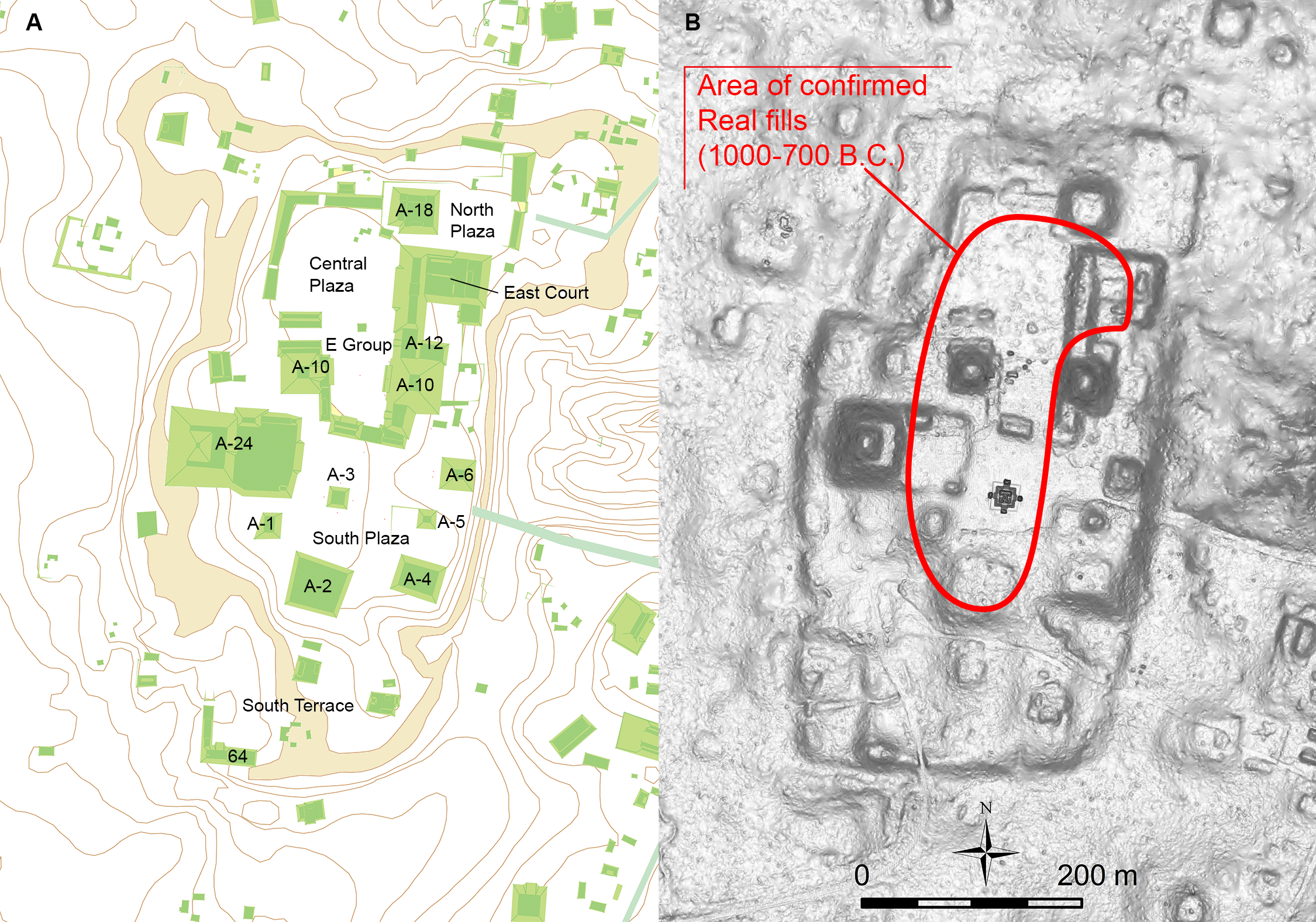 Fig 3. Grupo A meseta de Ceibal. A. Mapa producido por el HP (líneas de contorno de 1 m). B. DEM derivado de LiDAR. En el área roja se indica el área de rellenos confirmados en período Real.